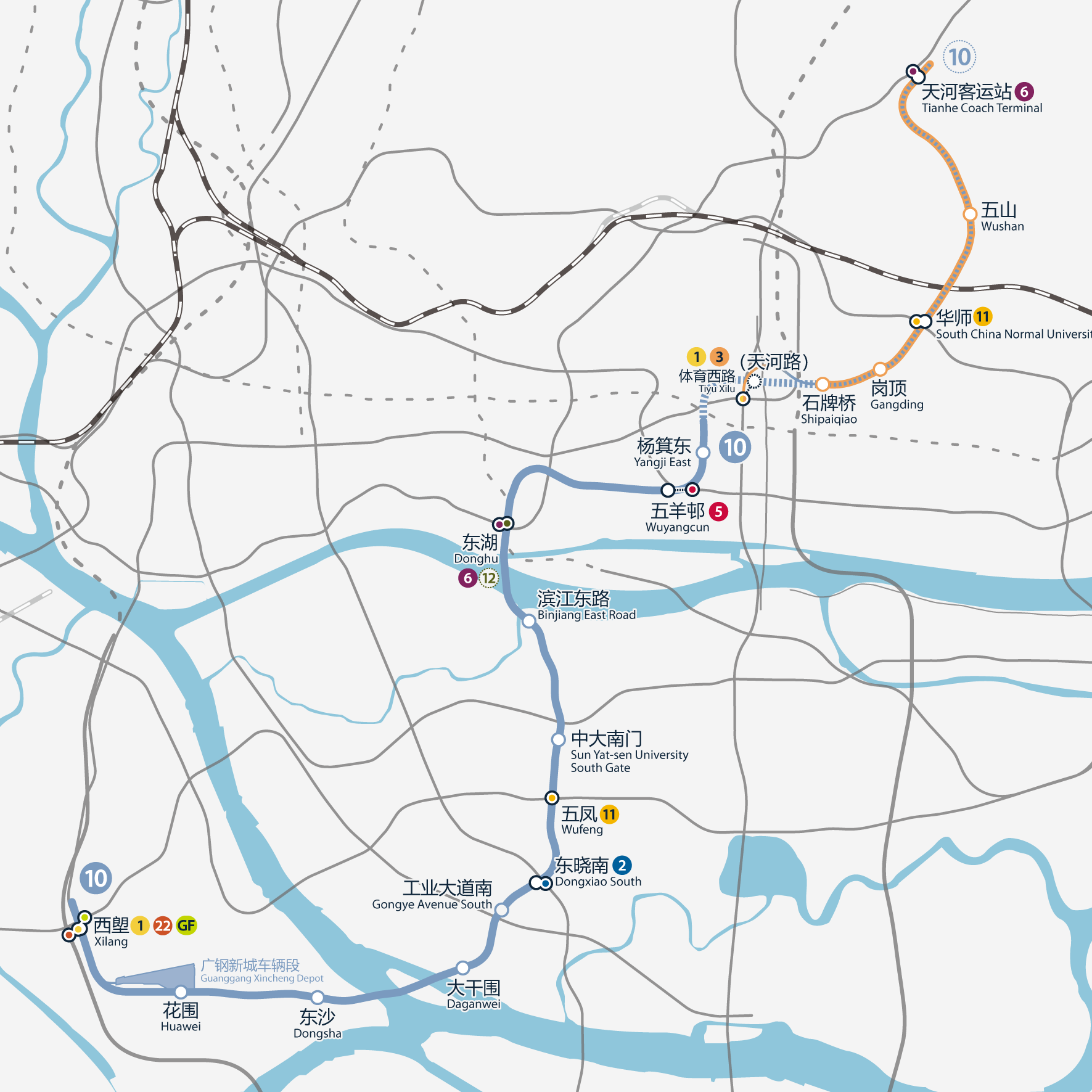 廣州地鐵10號線路線圖，按真實走向比例繪畫